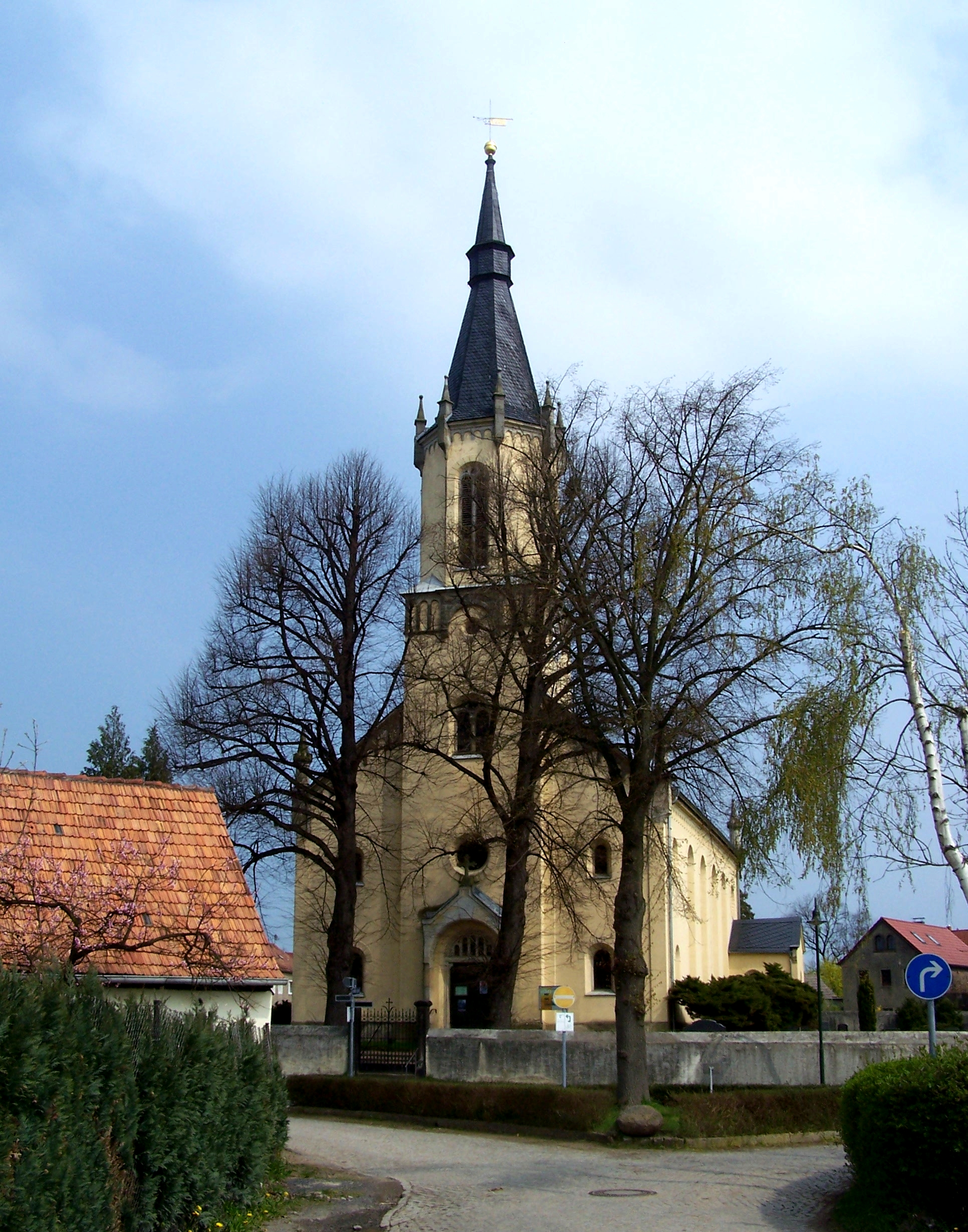 Kirche zu Bärwalde, Gemeinde Radeburg, Landkreis Meißen